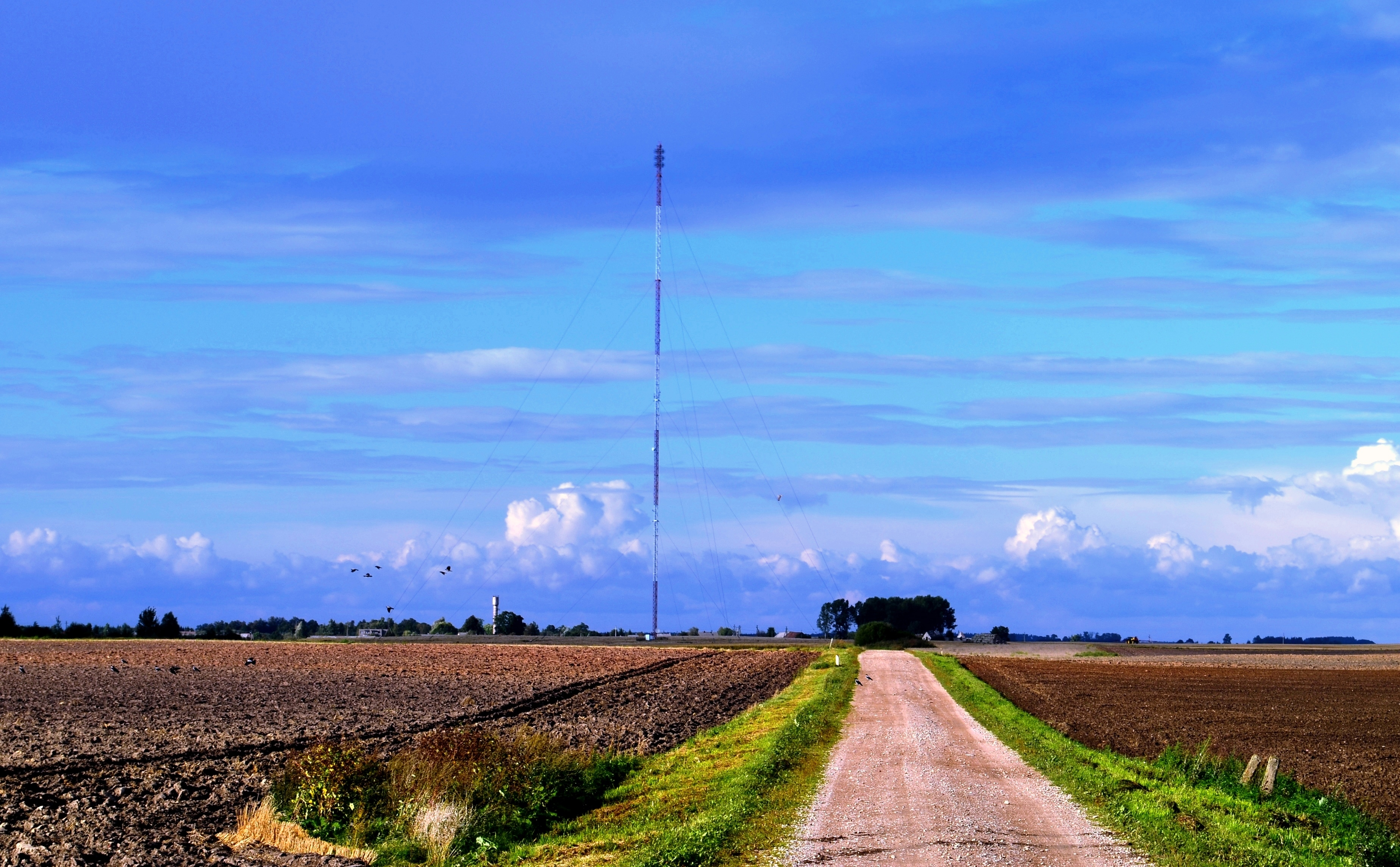 Telekomunikacijų bokštas, Dovydiškiai, Kėdainių r.